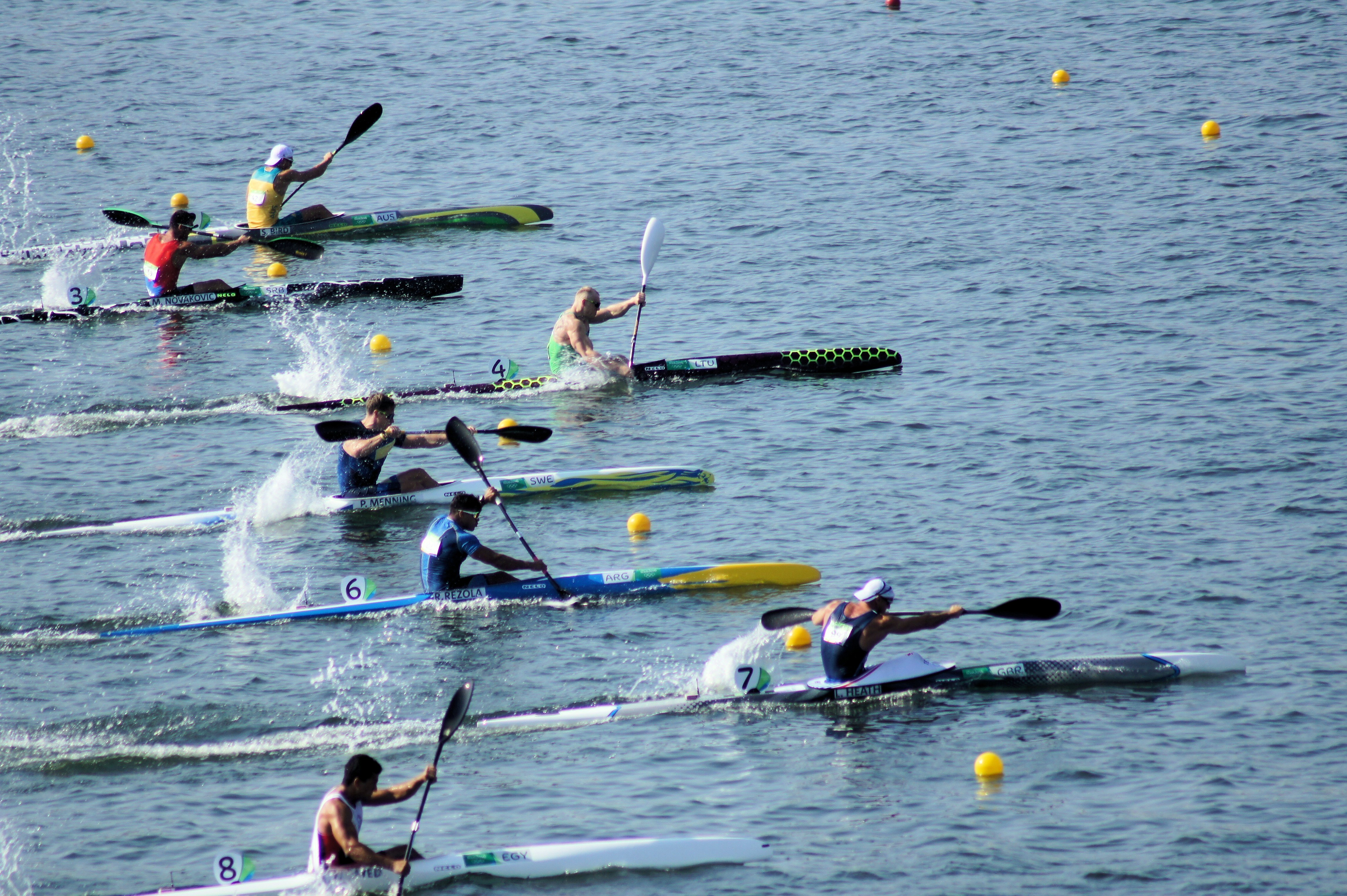 Rio 2016. Canoagem de velocidade/Canoe sprint - Men's K1 200m heat